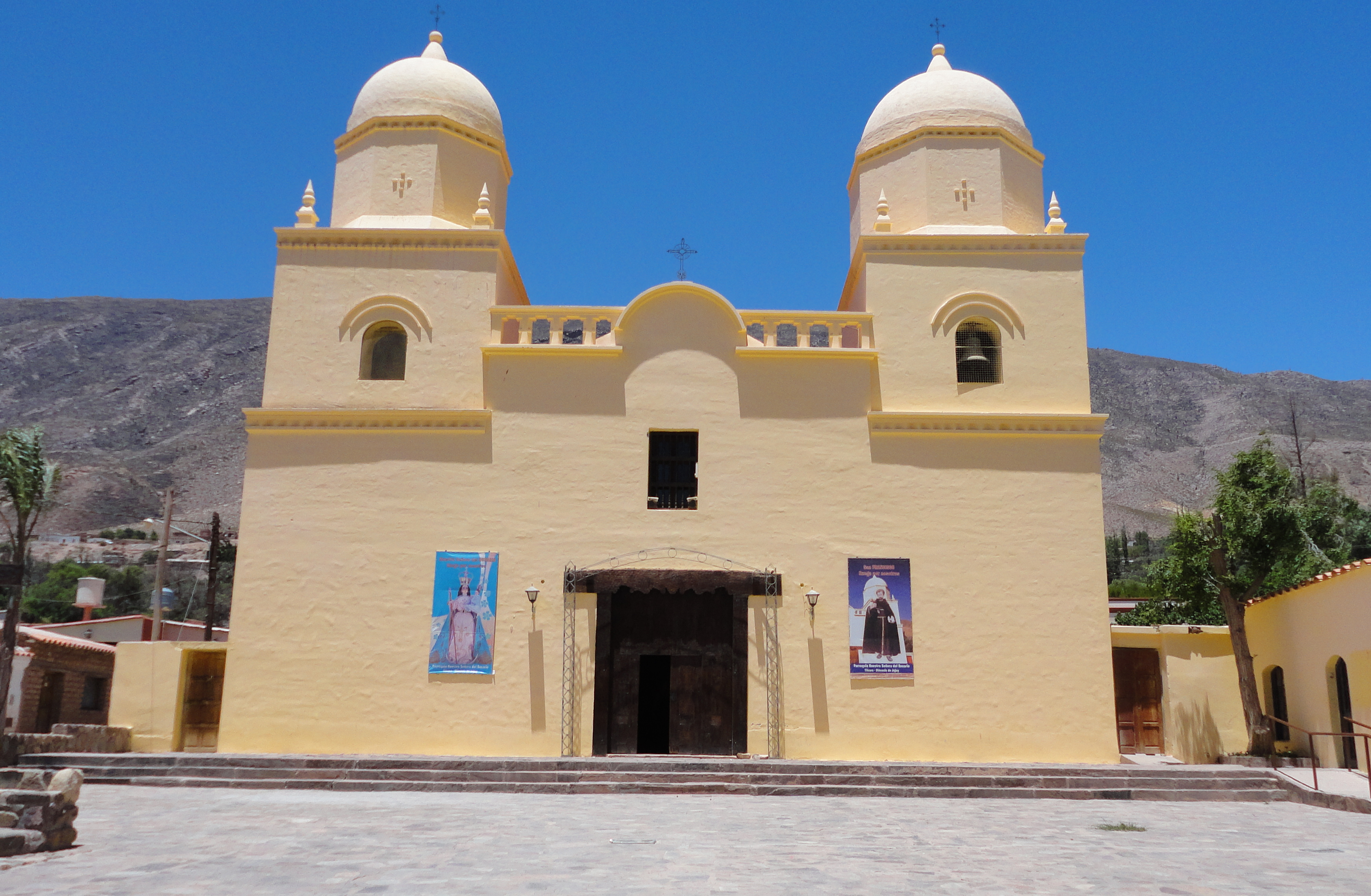 Hacia 1853 la Iglesia sólo contaba con las paredes y que para el año 1860, cuando Tilcara fue elegida la sede del curato, la Iglesia no se encontraba en buenas condiciones. Por ello, se iniciaron refacciones y fue terminada hacia el año 1865. Luego hubo una seguidilla de refacciones en los años 1879 y 1894. Posteriormente, en 1941, se hizo una nueva restauración y la misma es la que trazó el perfil que conserva en la actualidad.